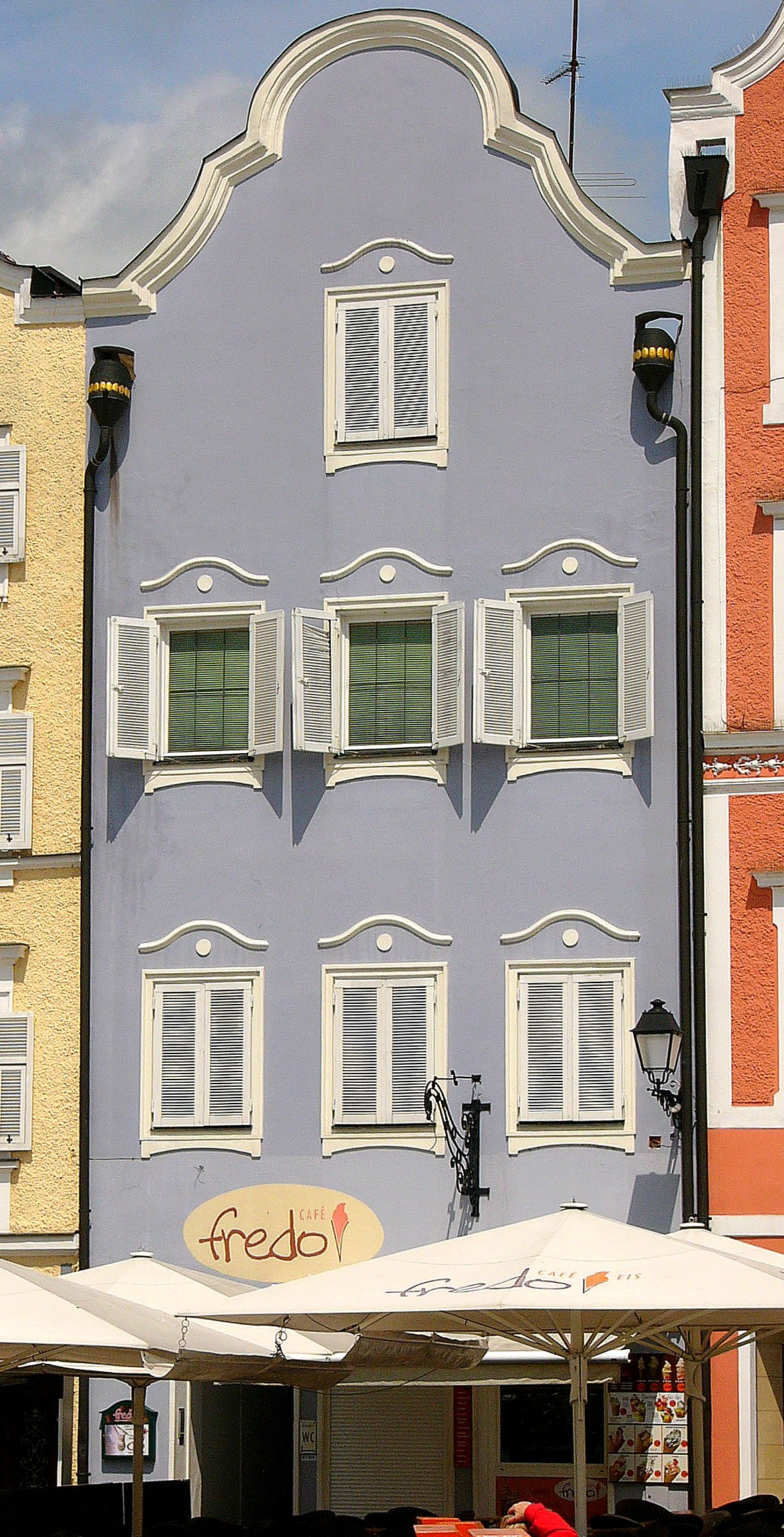 Bürgerhaus